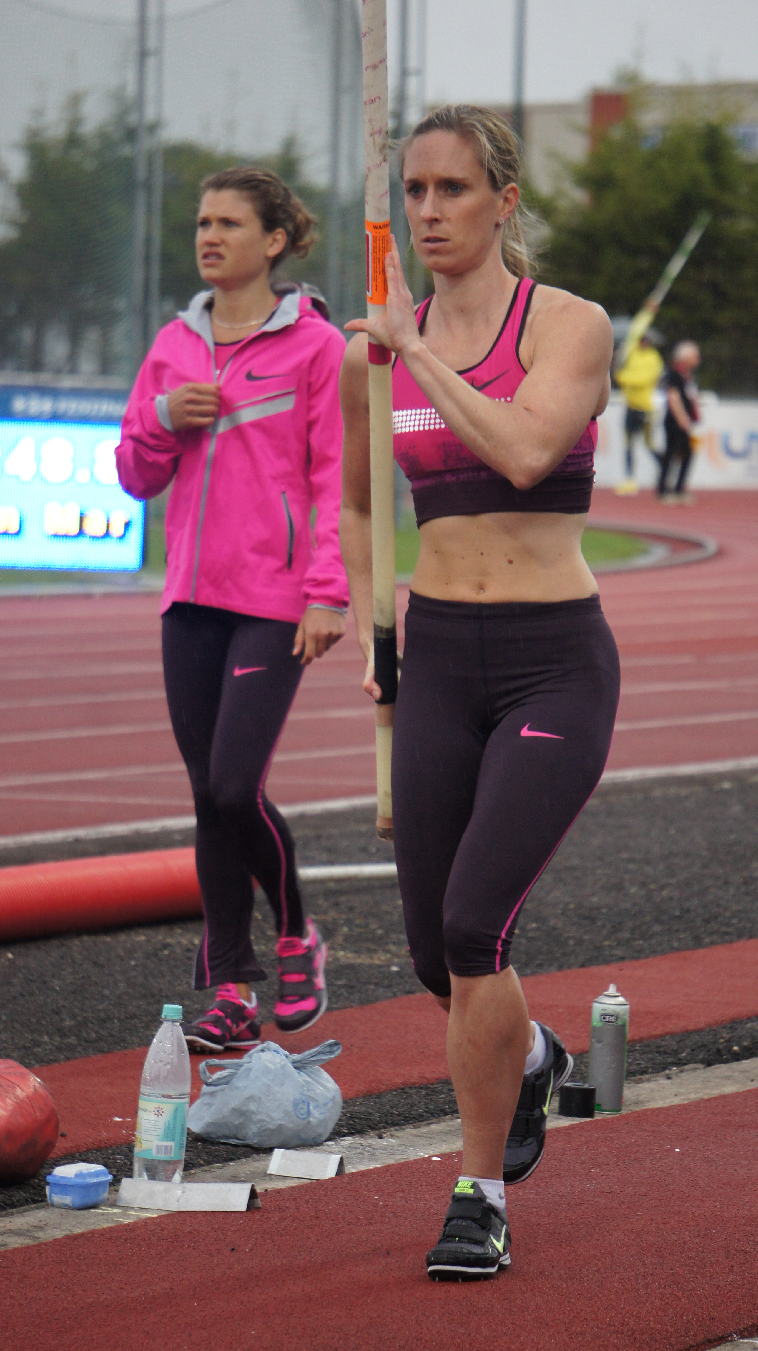 Alana Boyd lors des rencontres d'athlétisme de Reims 2013 . Marion Lotout en arrière plan .